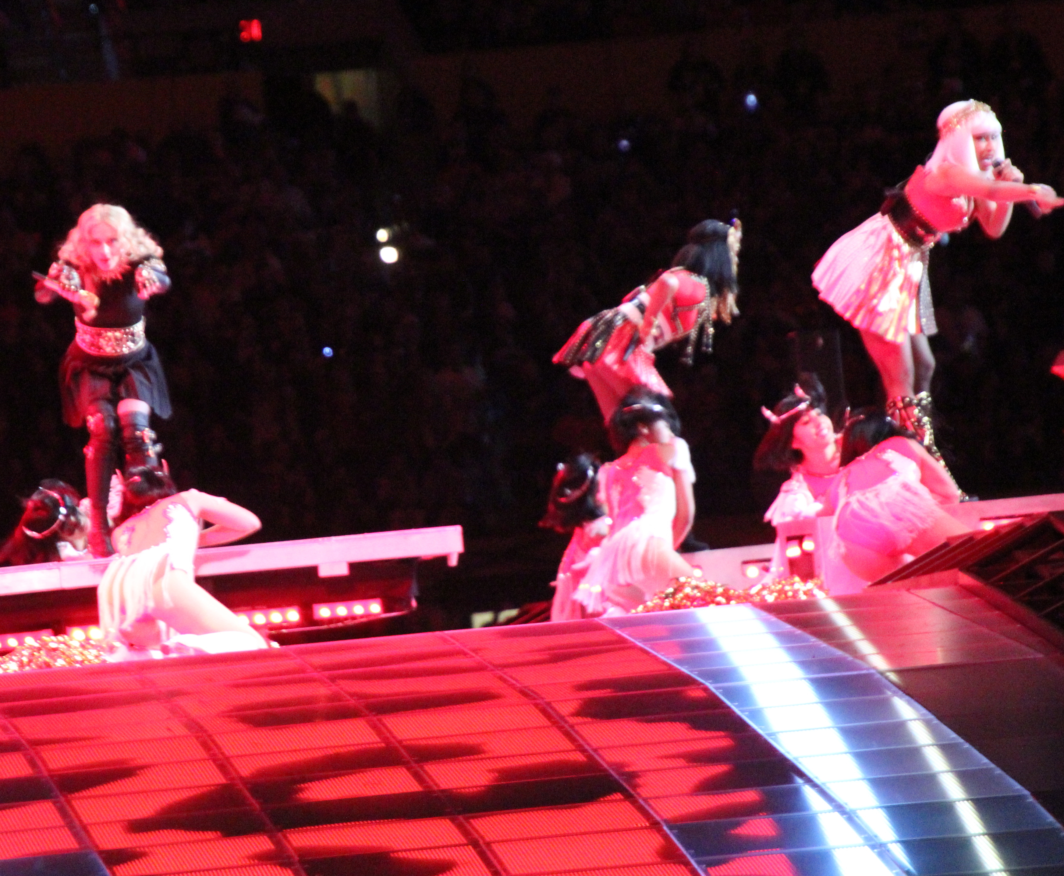 2012-02-05 Super Bowl Drumline Halftime Show